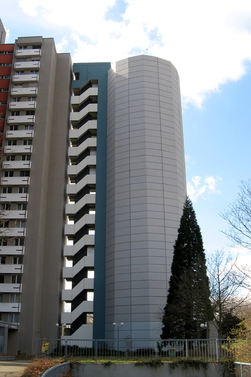 Wassersilo Tübingen (März 2007) eigenes Foto / alle Rechte freigegeben